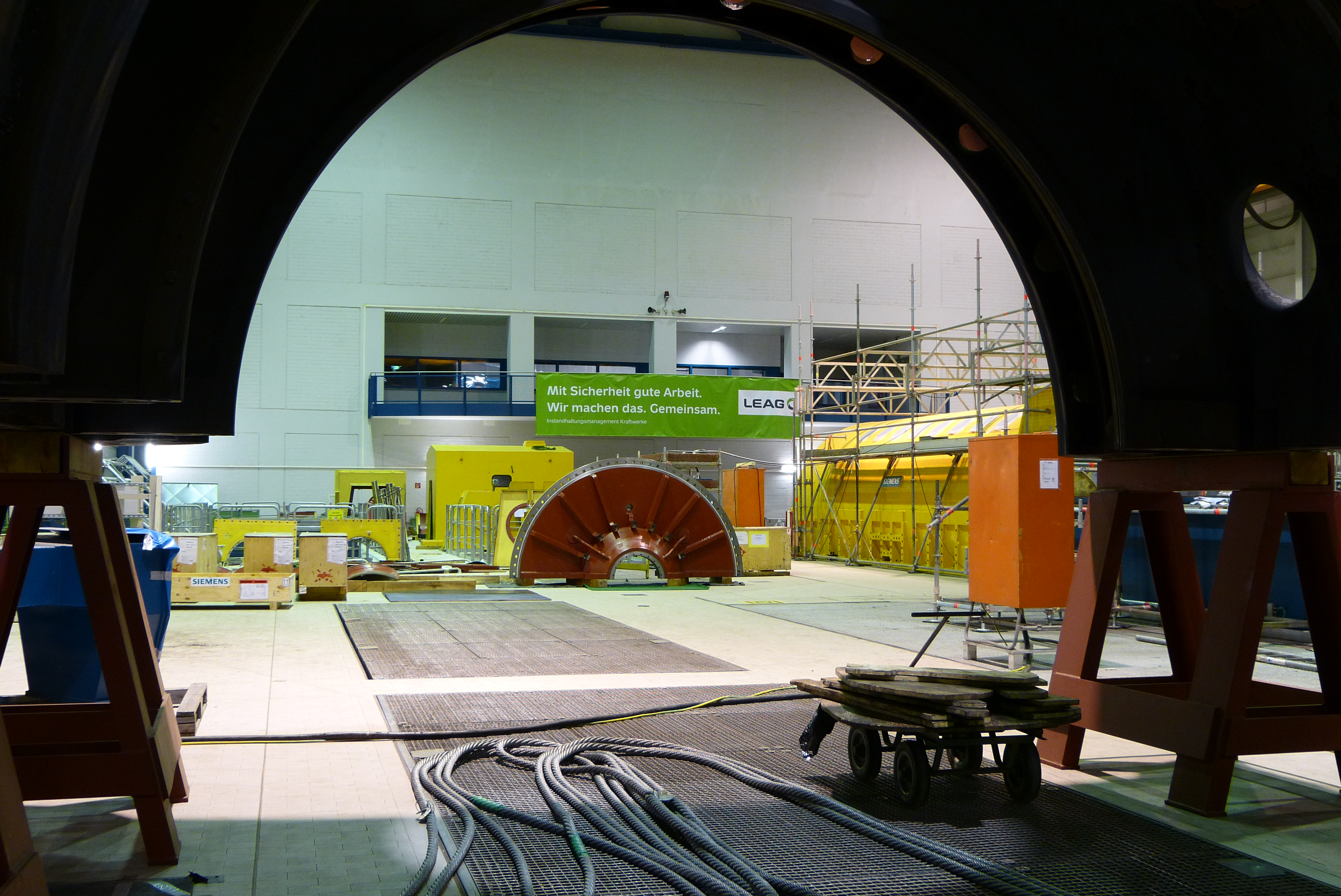 Blick zur Blockwarte während der Revision Block A im LEAG Kraftwerk Schwarze Pumpe